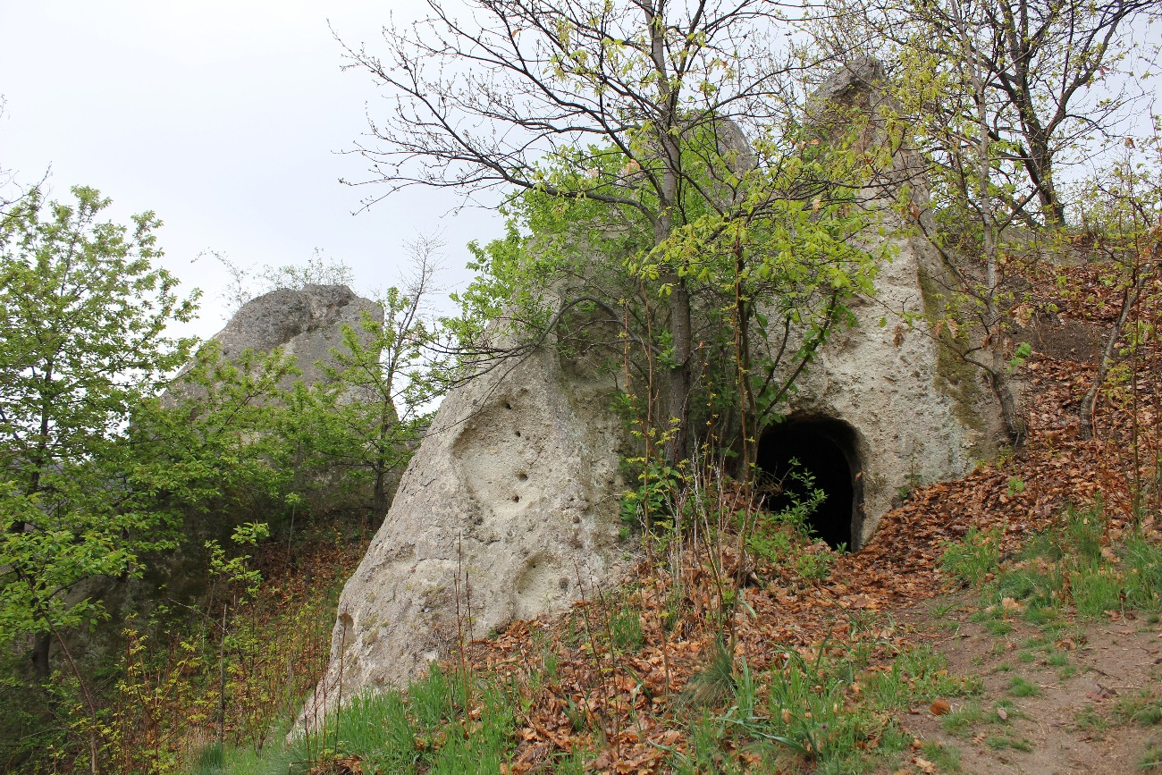 H2c, Eger, Mész-hegy, 2. szikla